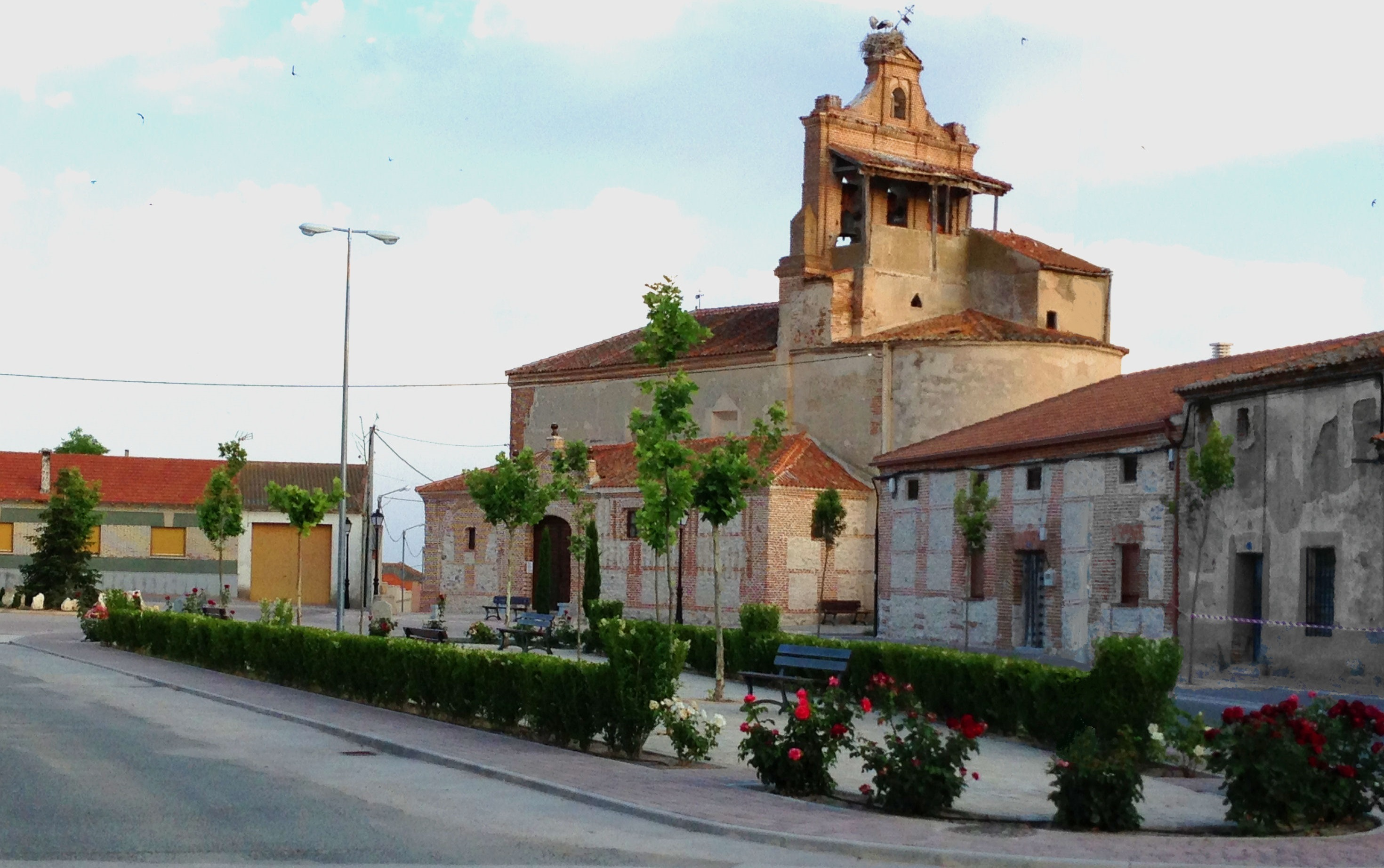 Vista de la plaza de Martín Muñoz de la Dehesa en la provincia de Segovia